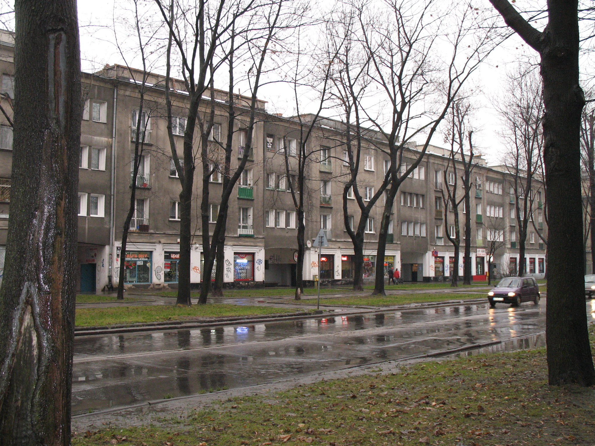 Sklepy na Osiedlu Górali w Krakowie.